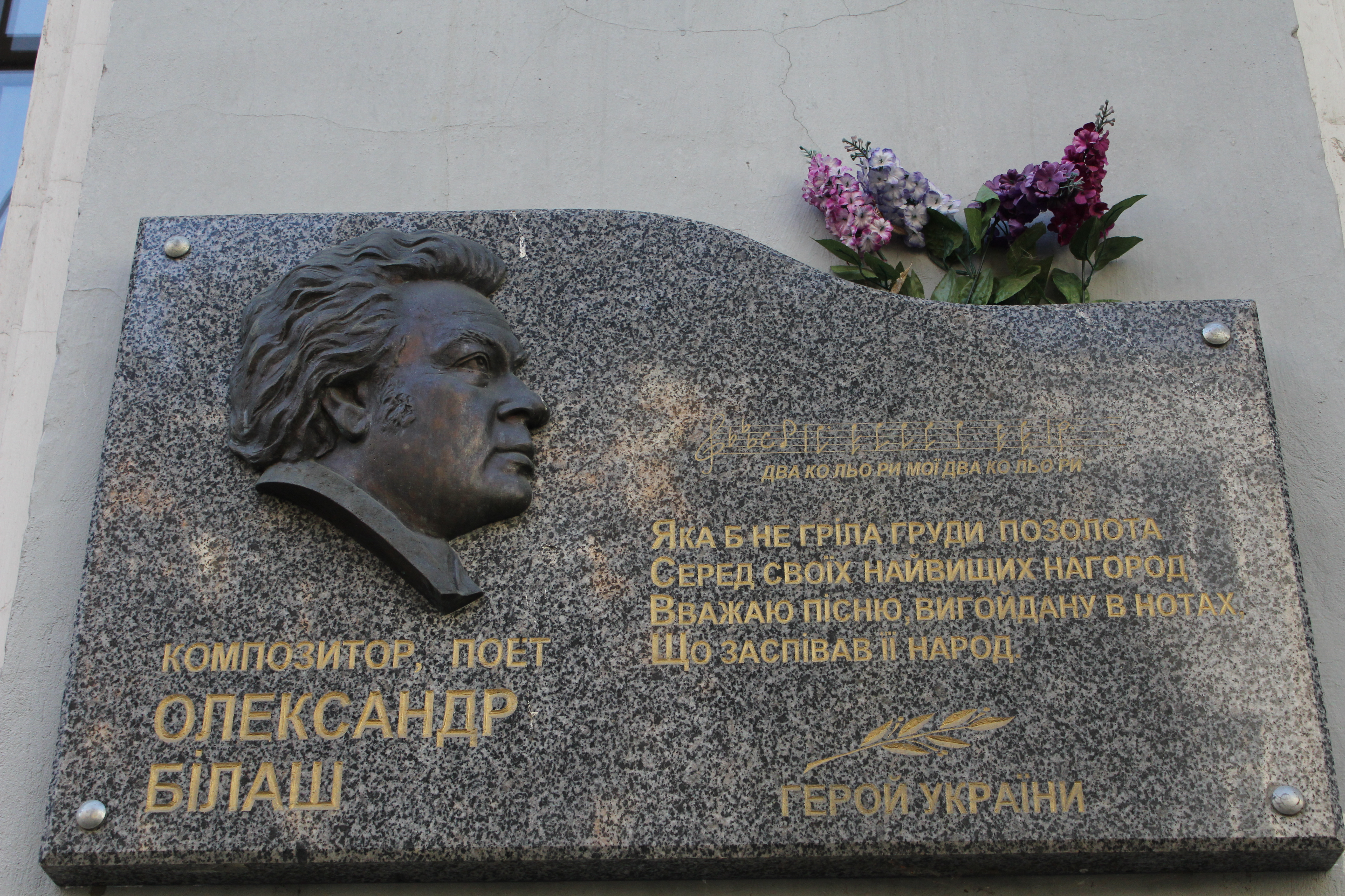 Будинок прибутковий, Київ, Пушкінська вул., 8-а